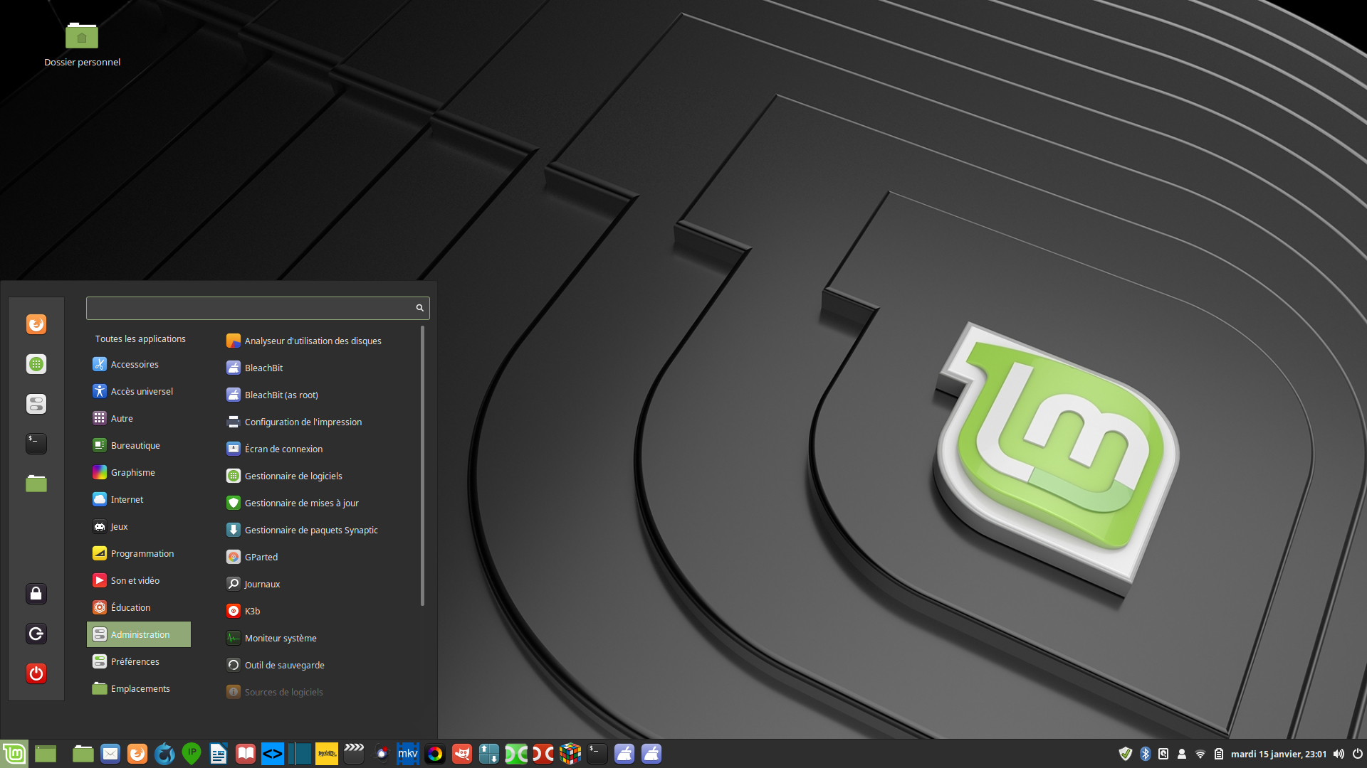 Capture d'écran du bureau de Linux Mint LMDE 3